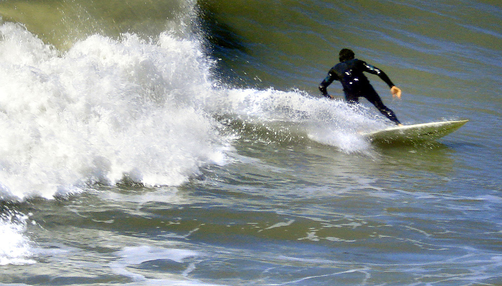 surf na guarita